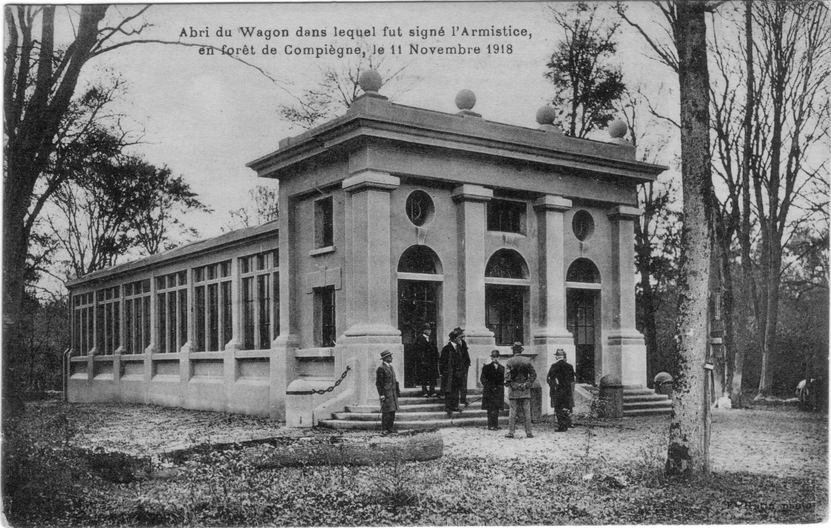 Rethondes : Ancien bâtiment qui abritait le wagon de l'armistice